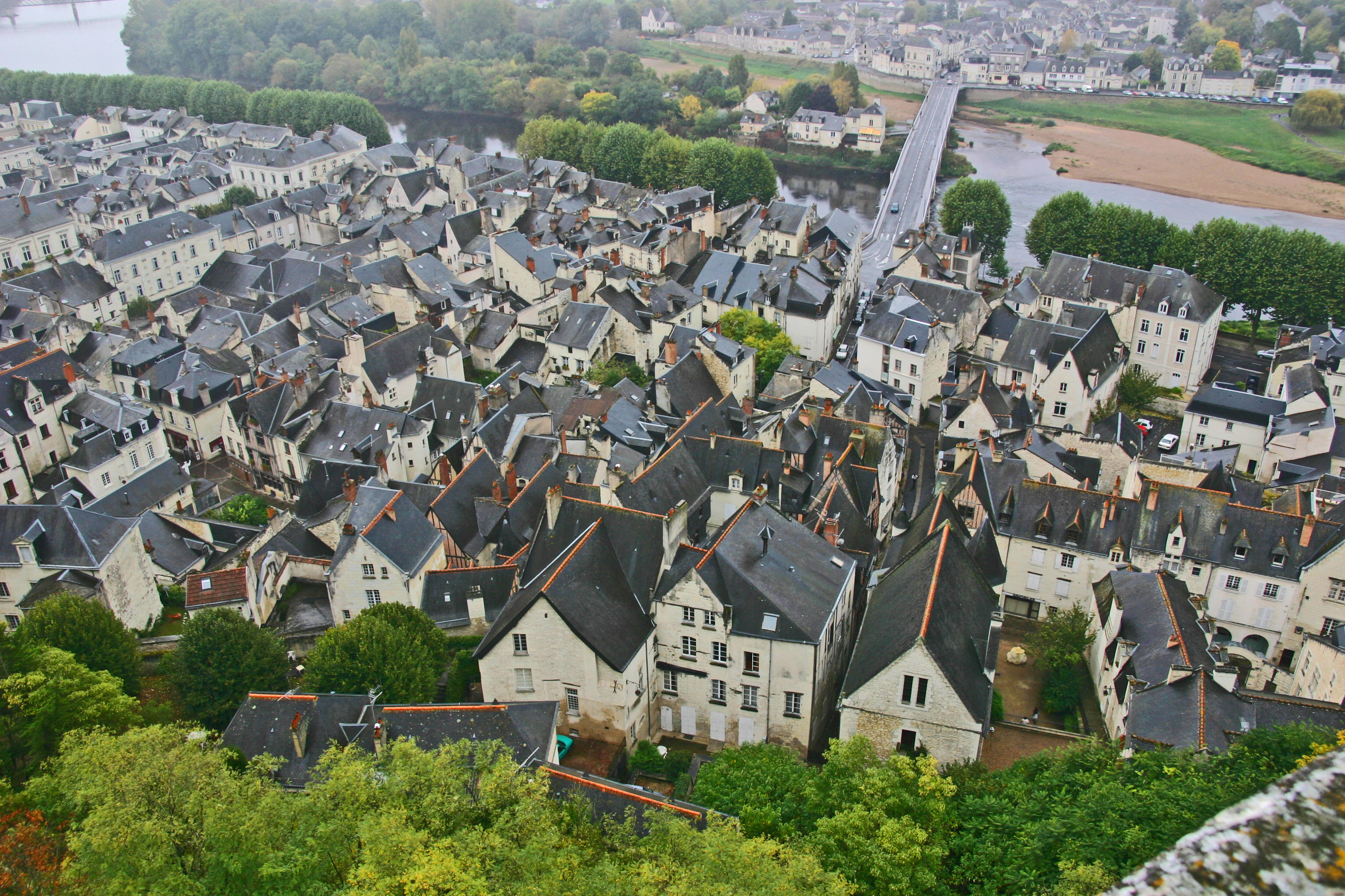 Chinon